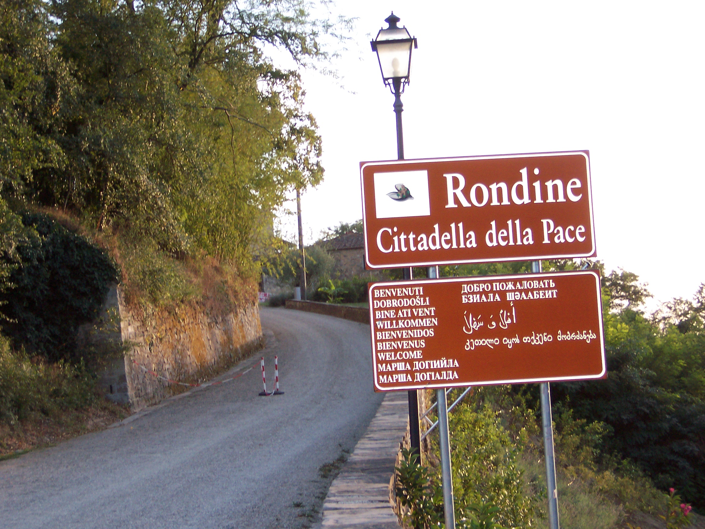 Rondine (Arezzo)